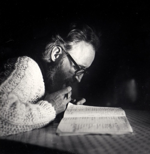 Le compositeur, automne 1980